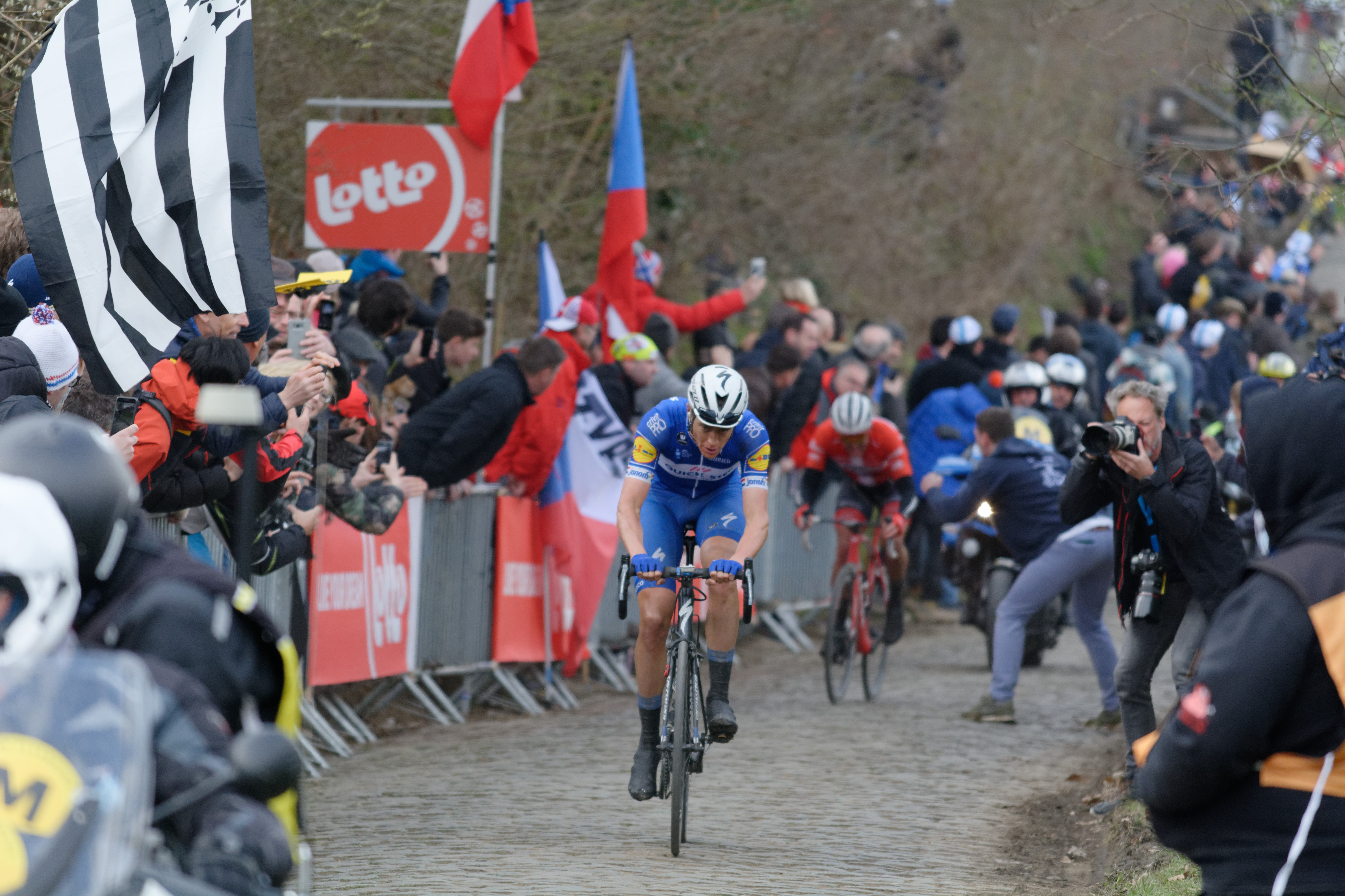 Ronde Van Vlaanderen 2018 / Tour of Flanders 2018 Oude Kwaremont